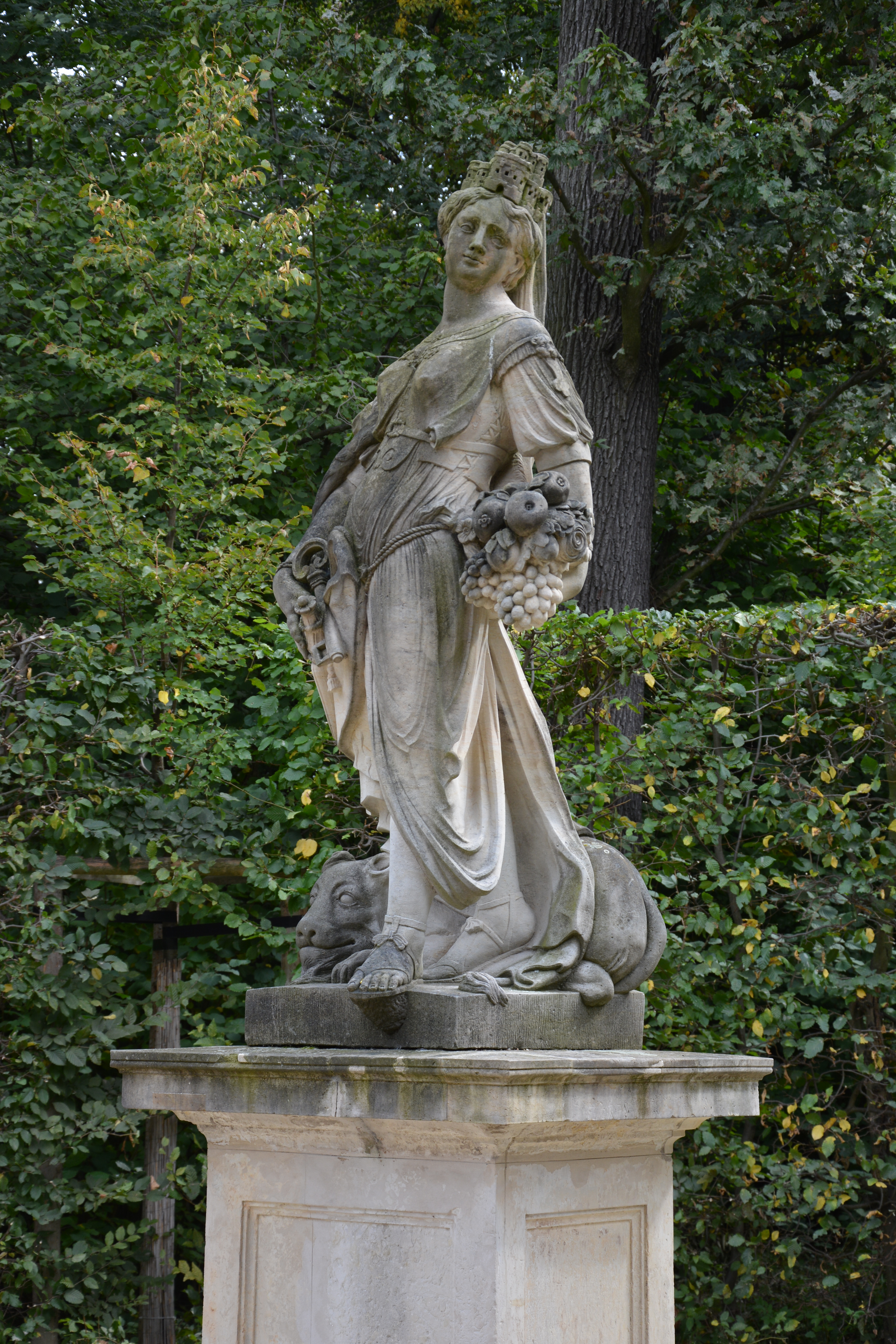 Statue der Rhea im Barockgarten Großsedlitz